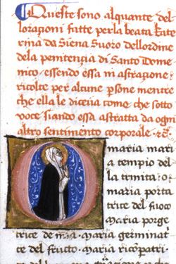 S. Caterina in preghiera, in Orazioni in volgare italiano, sec. XV, Siena, Biblioteca Comunale, Ms. T. II. 7, f. 161r